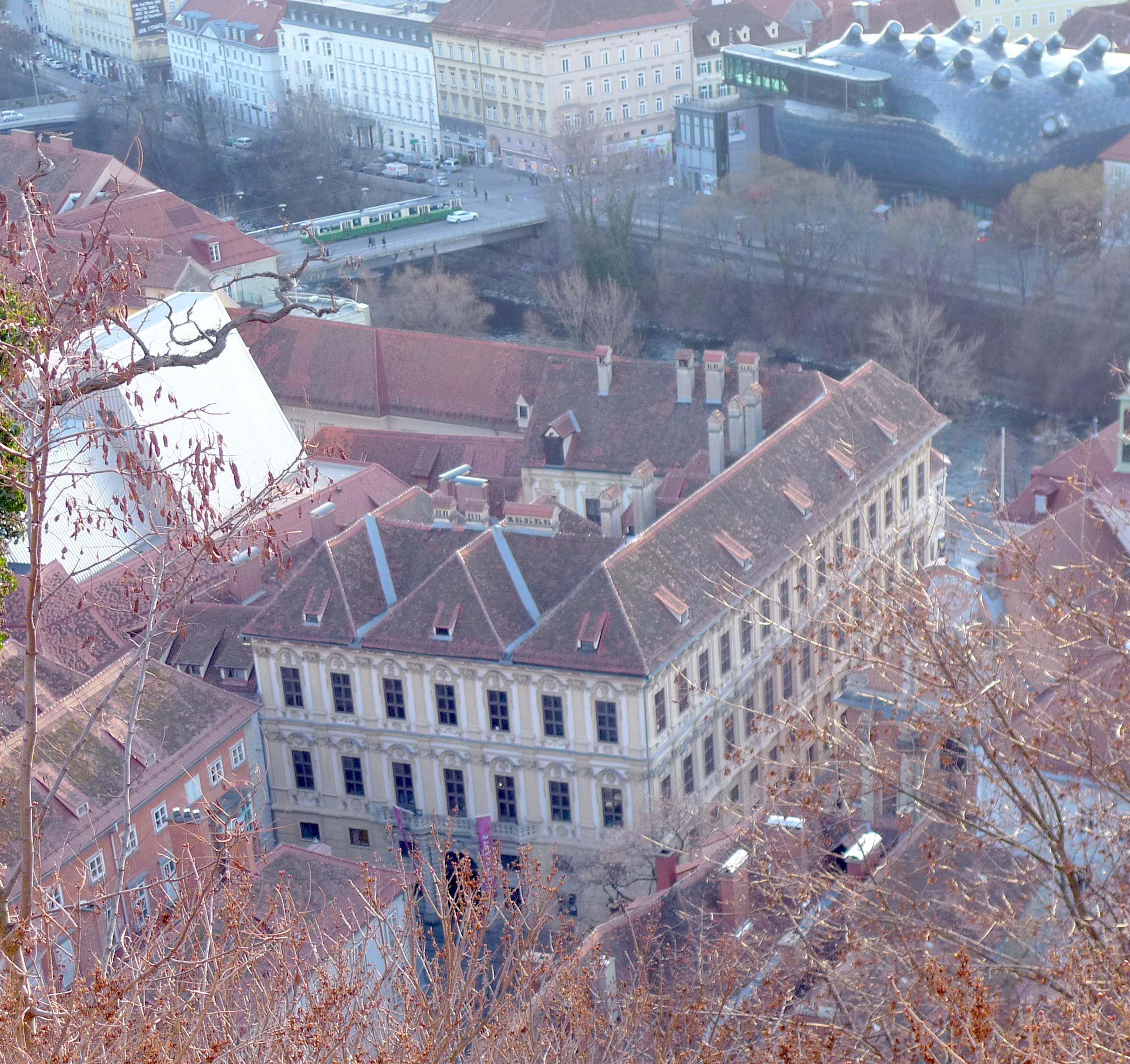 Ehem. Palais Attems